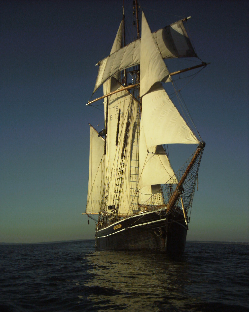 Autor: Fin- Jasper Langmack Frontansicht der SS Albatros